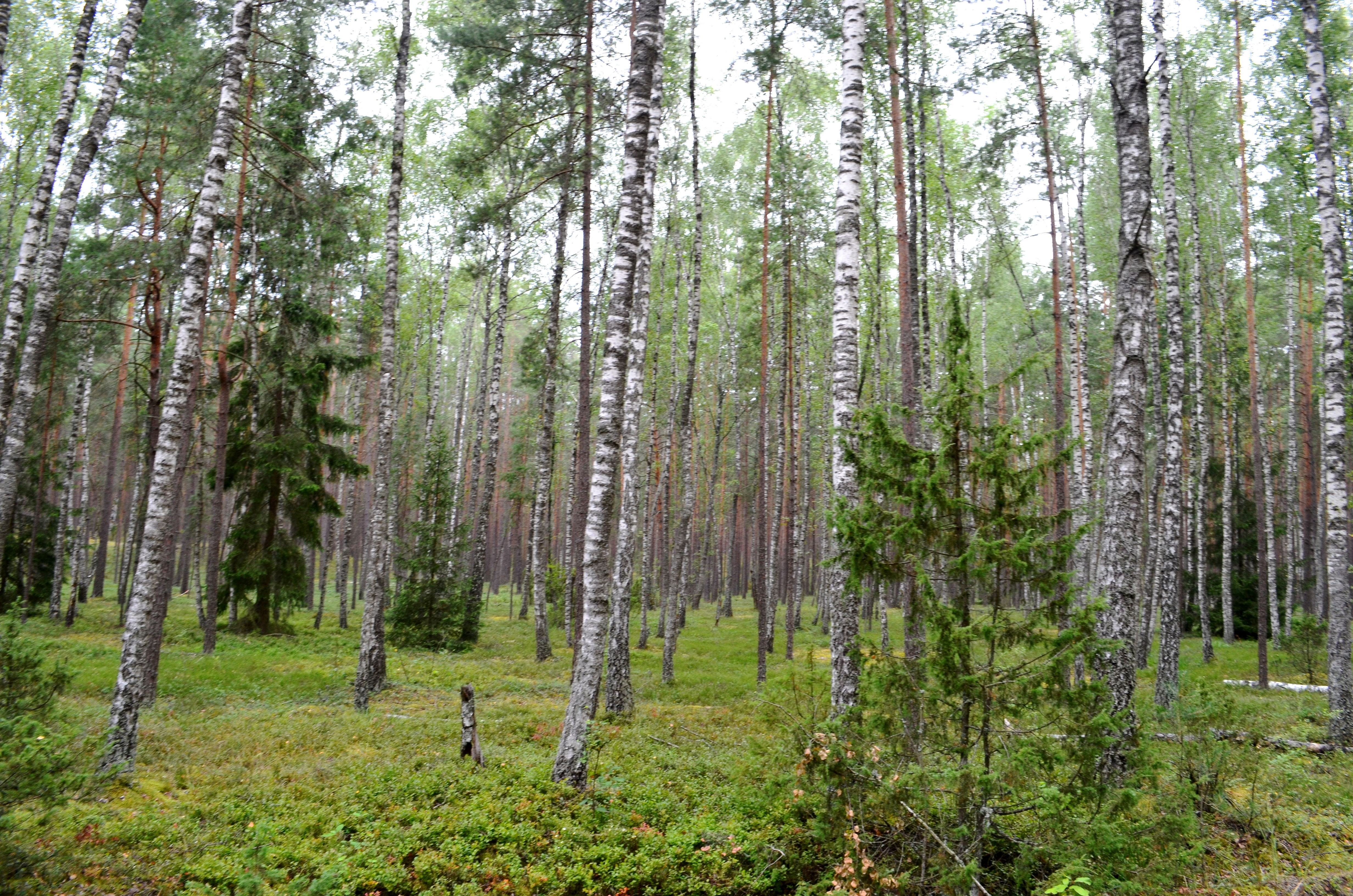 Beržynas su kadagių pomiškiu, Varėnos r.